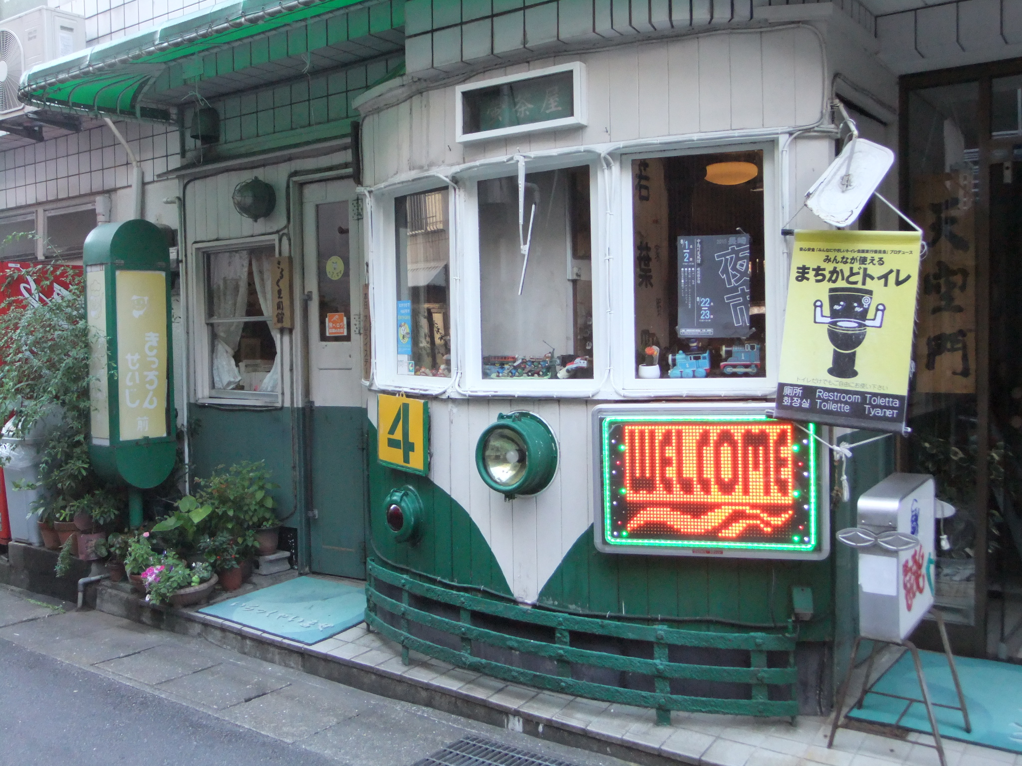 長崎電気軌道800形 「きっちん・せいじ」の内外装として再生された